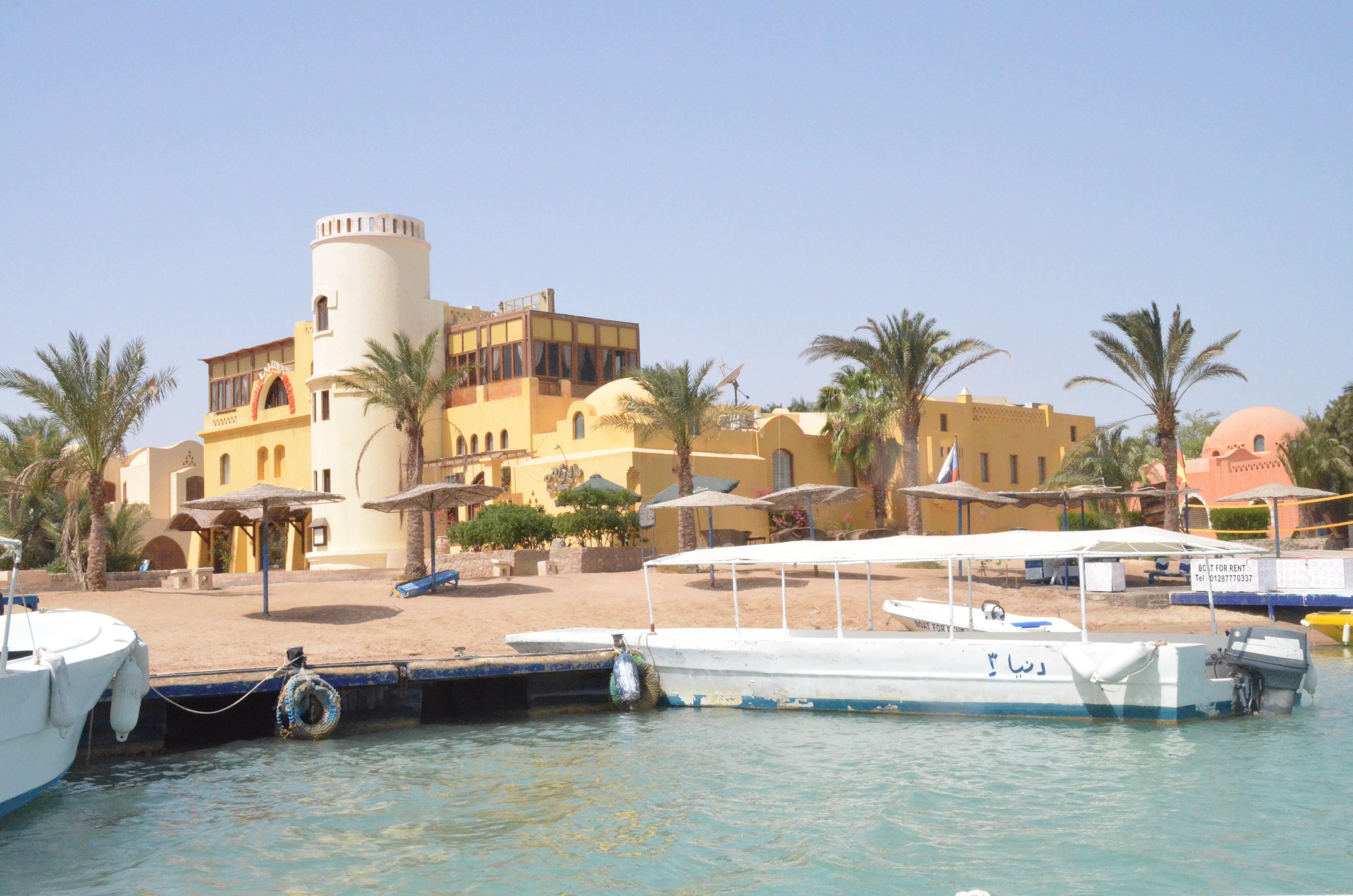 مناظر في الجونة